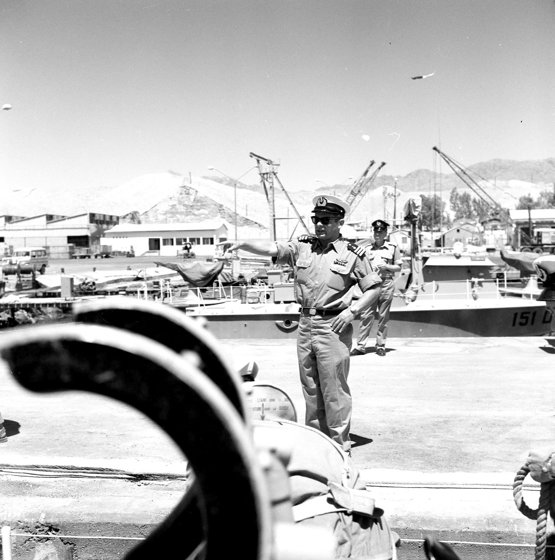 סא"ל מנחם כהן מפקד זירת ים סוף על הרציף בנמל הצבאי באילת 1962